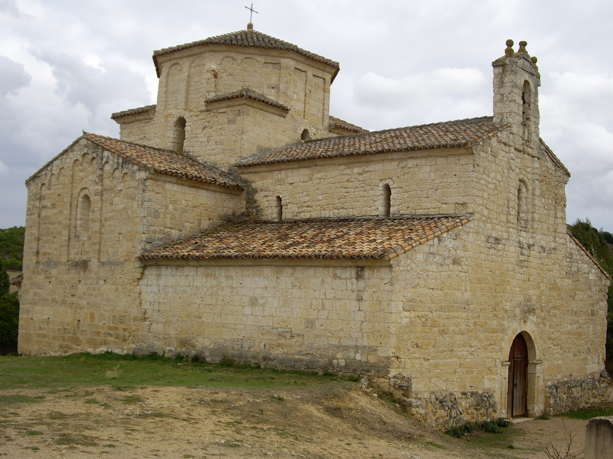 Santa María de la Anunciada eliza